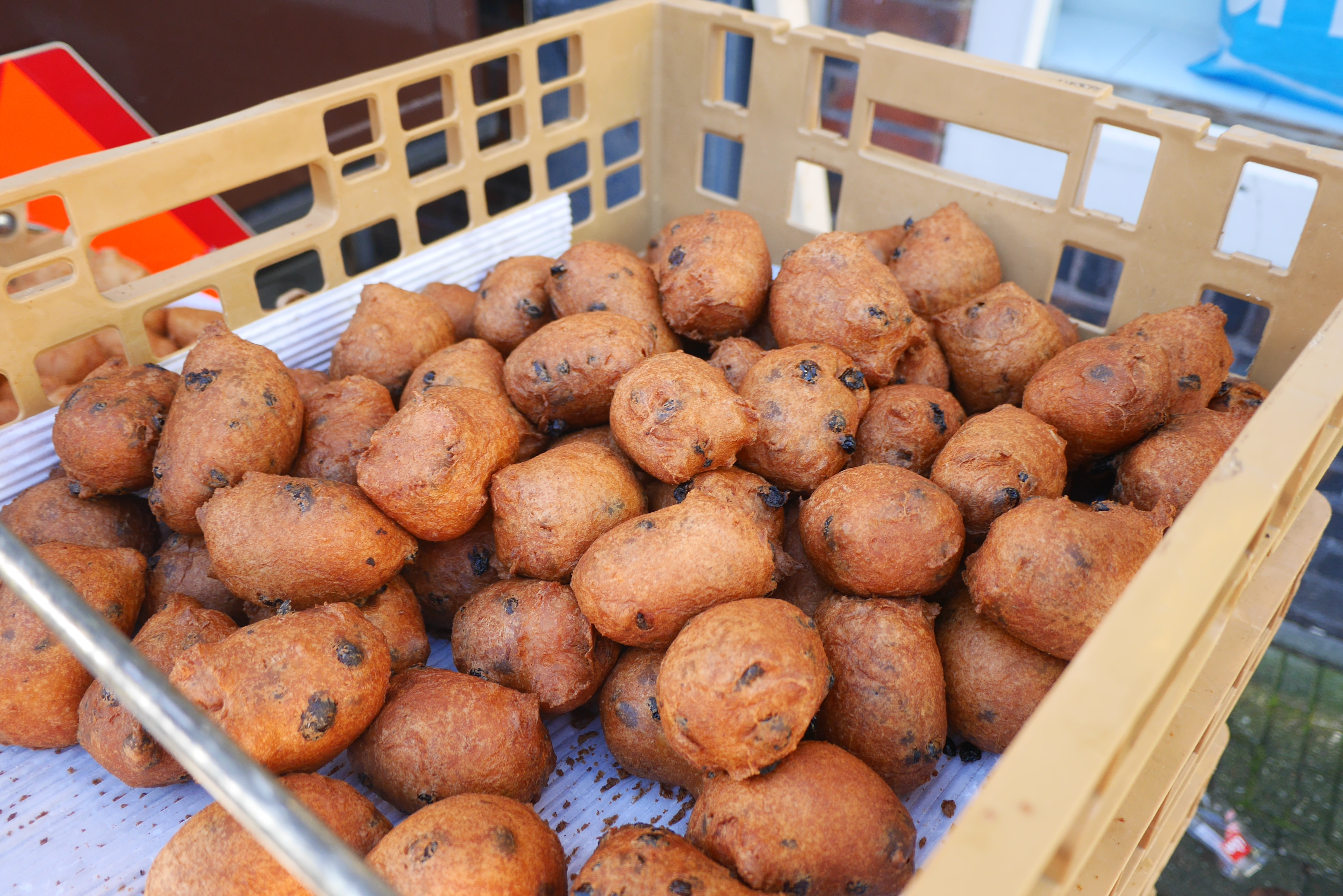 Oliebollen met krenten